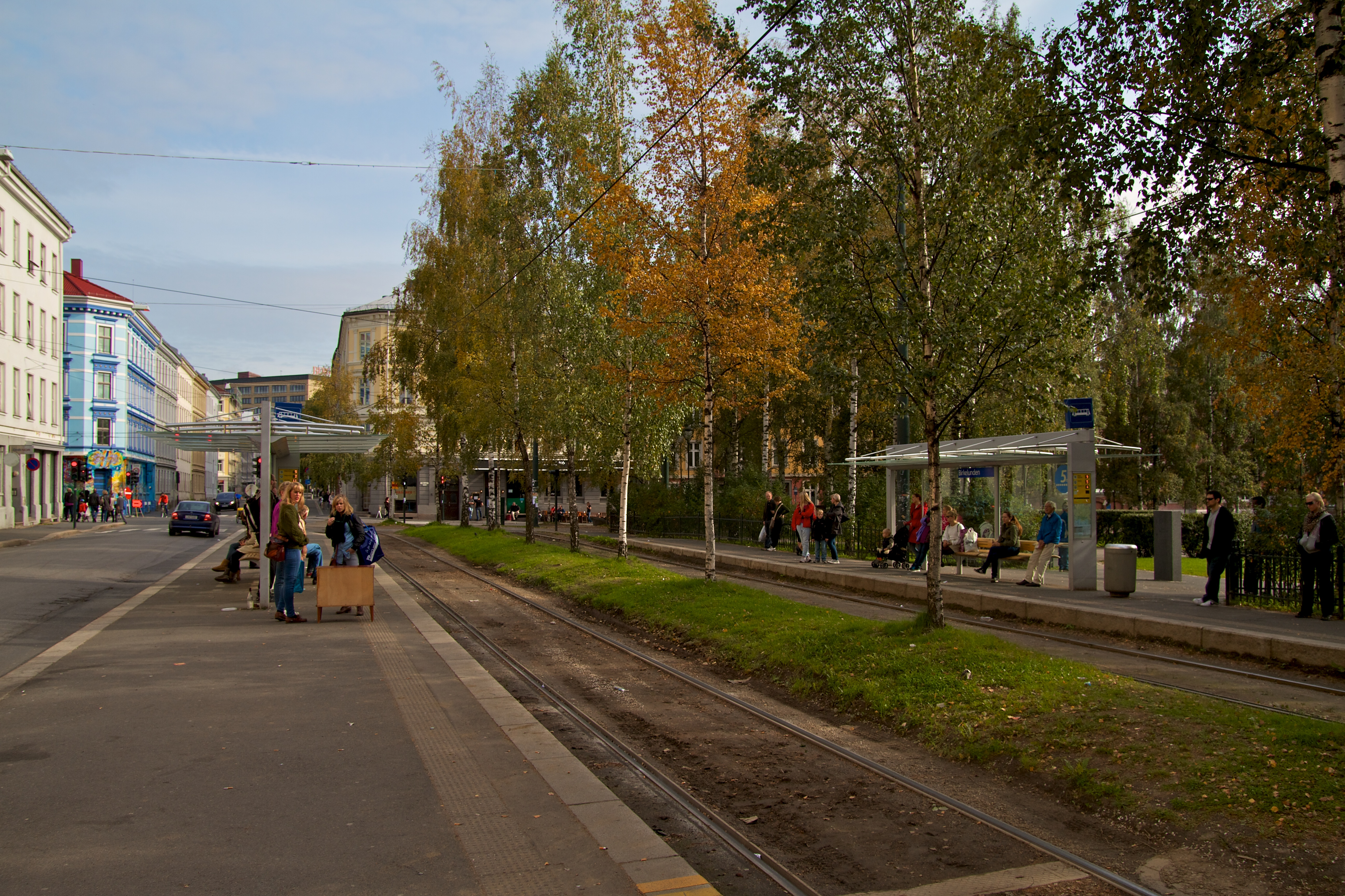 Birkelunden holdeplass